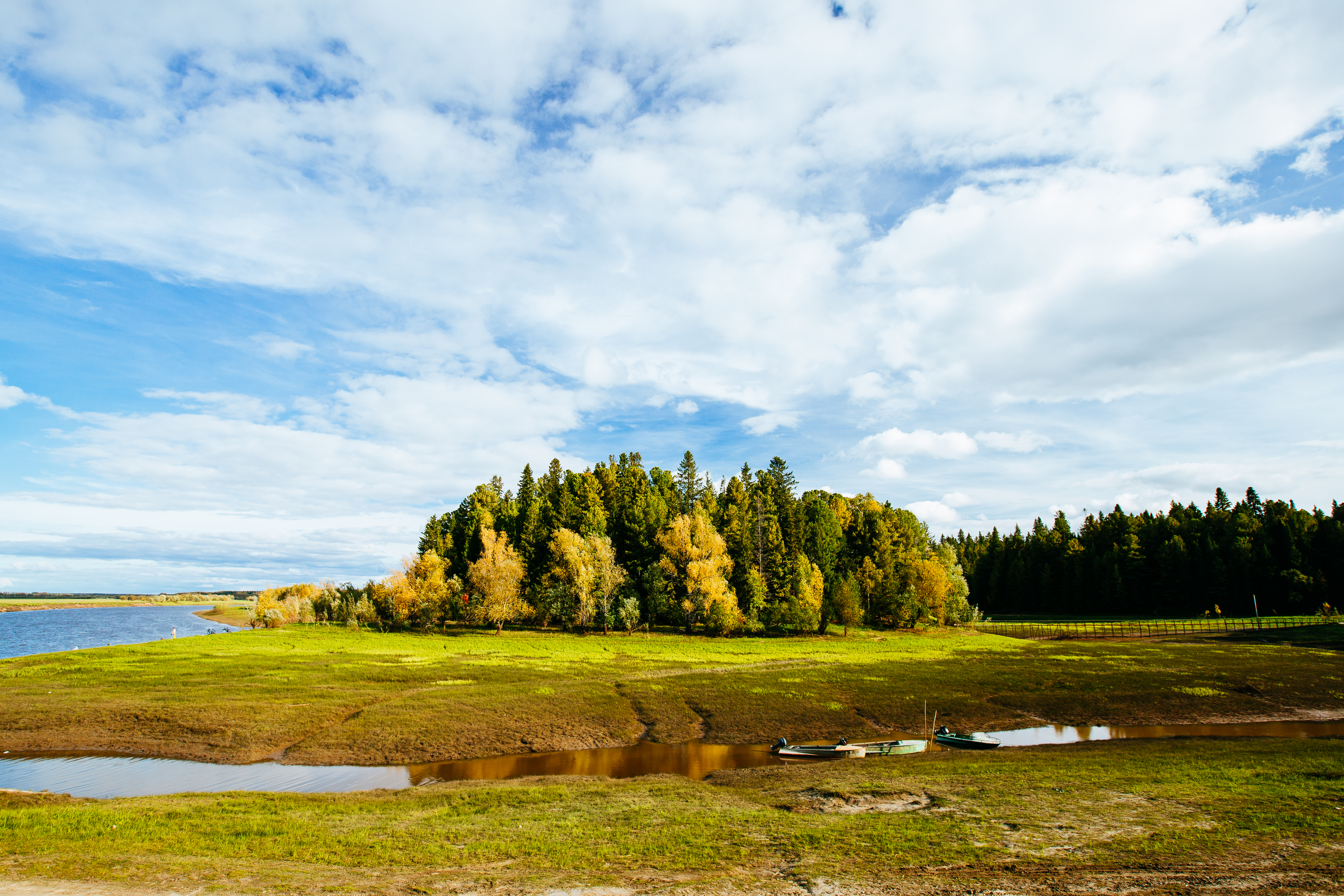 Поселение Шапша I: 0.4-0.5 км к востоку, северо-востоку от деревни, левый берег р.Шайтанская, Шапша, Ханты-Мансийский район, Ханты-Мансийский автономный округ